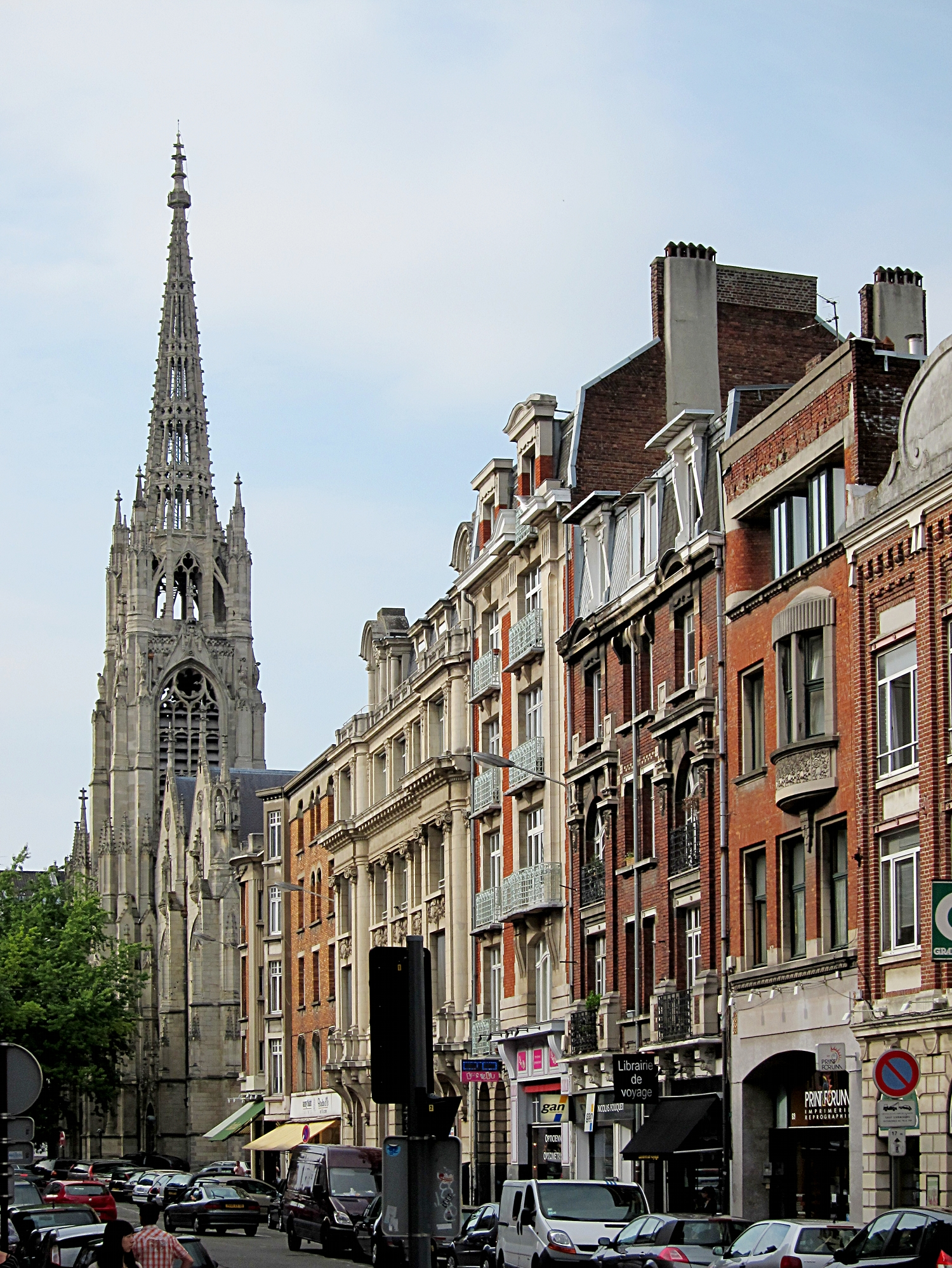 La rue de Paris à Lille (Nord).